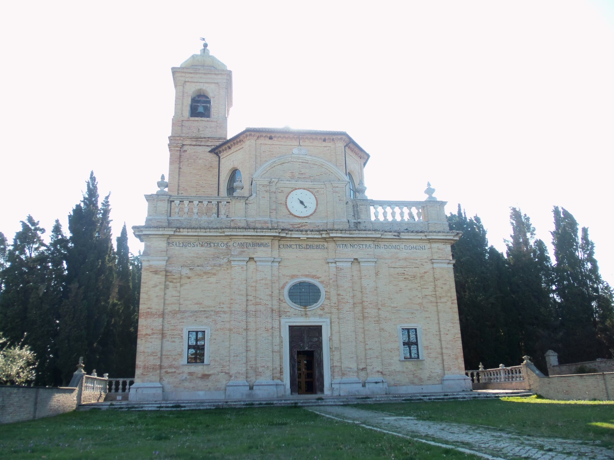 Facciata principale della Chiesa (Camaldolesi Ordine San Benedetto)- Eremo di Monte Giove, Fano